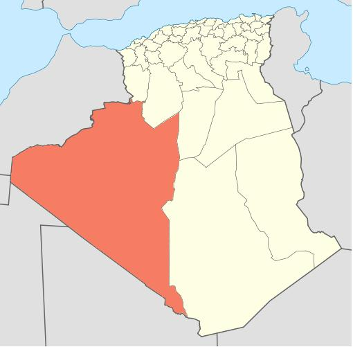 Région de la Saoura en Algérie